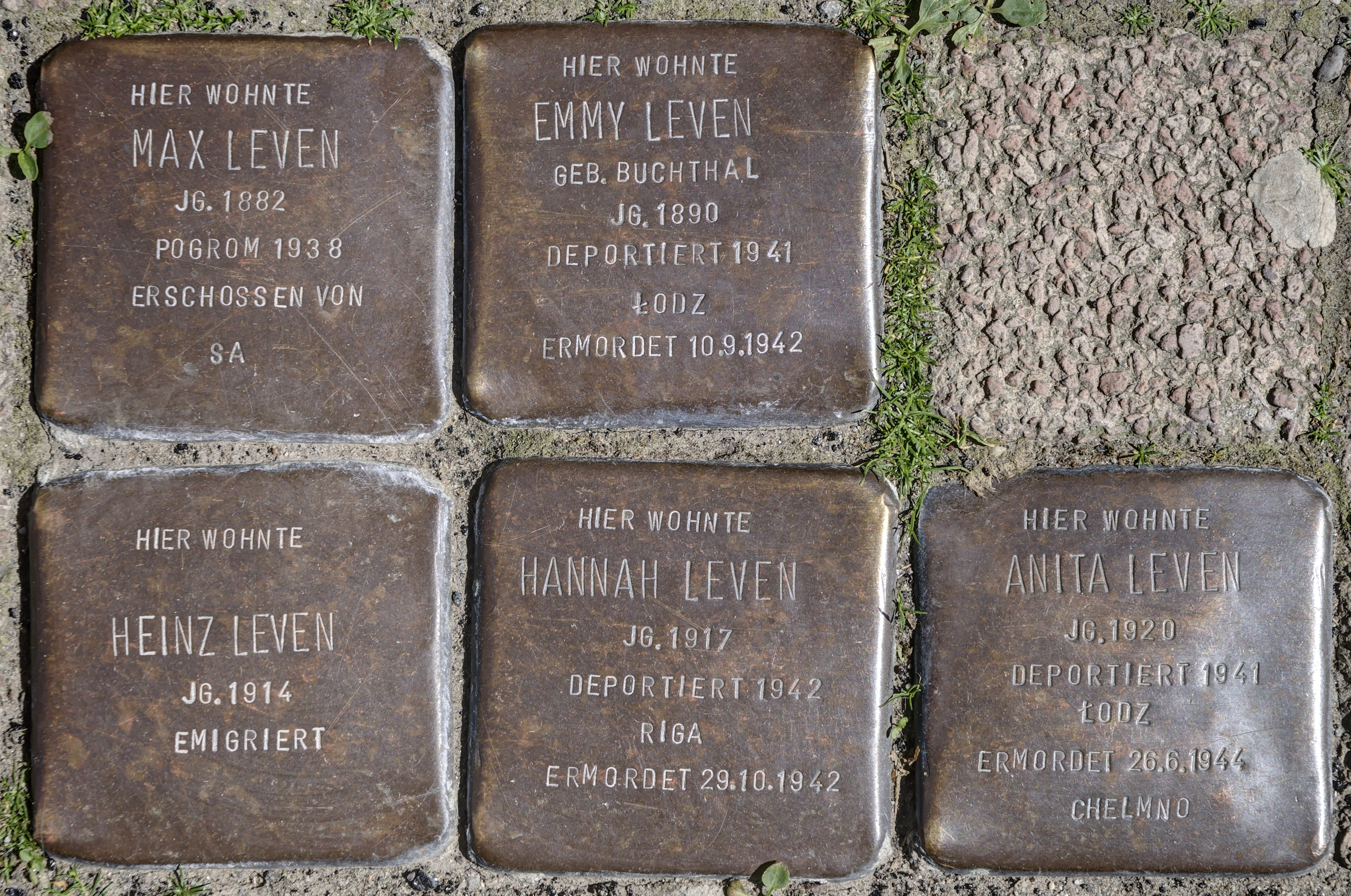 Stolperstein Solingen, Max-Leven-Gasse 5 Familie Leven komplett